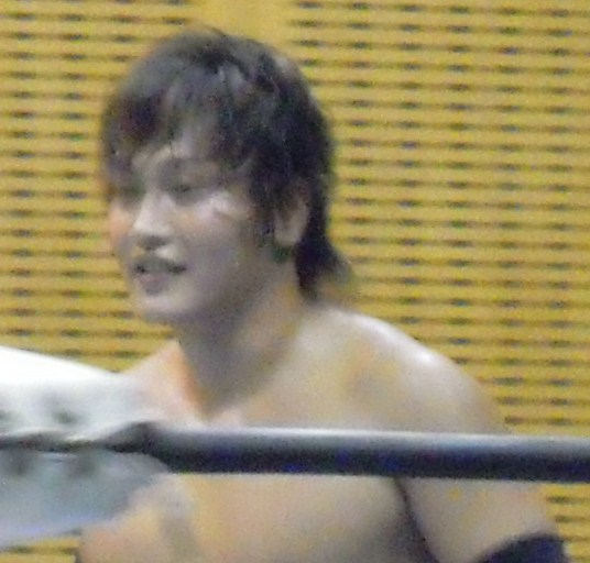 滝澤大志 2010年8月15日 KAIENTAI-DOJO千葉ポートアリーナ大会 投稿者撮影